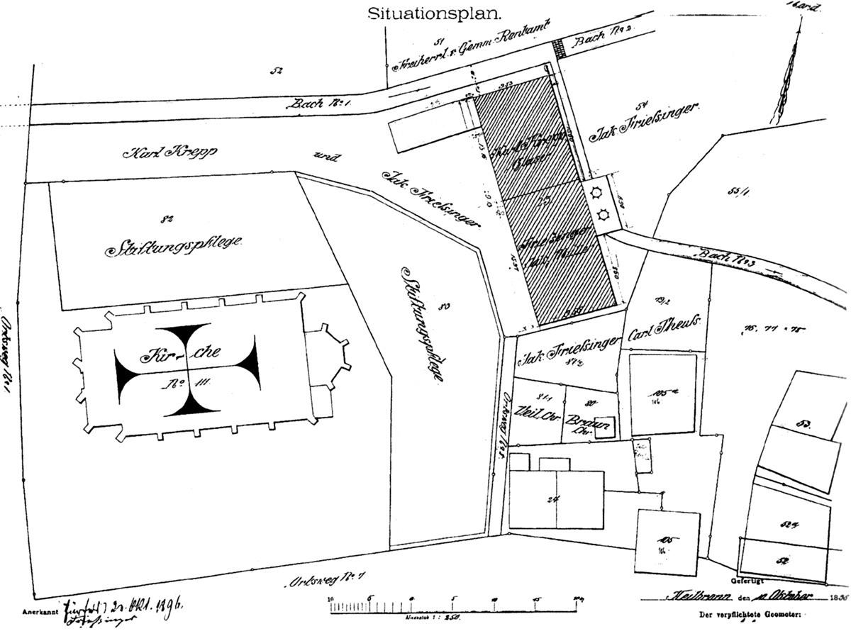 Lageplan der Kirche in Fürfeld anläßlich eines benachbarten Mühlenneubaus im Jahr 1896